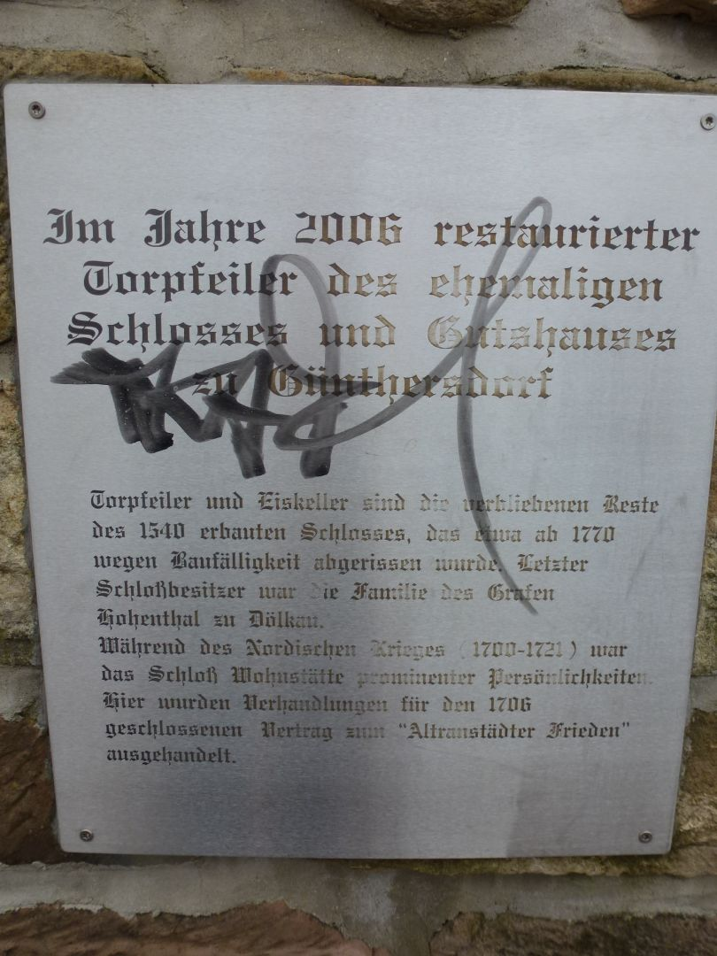 Tafel zur Erinnerung an das Günthersdorfer Schloss